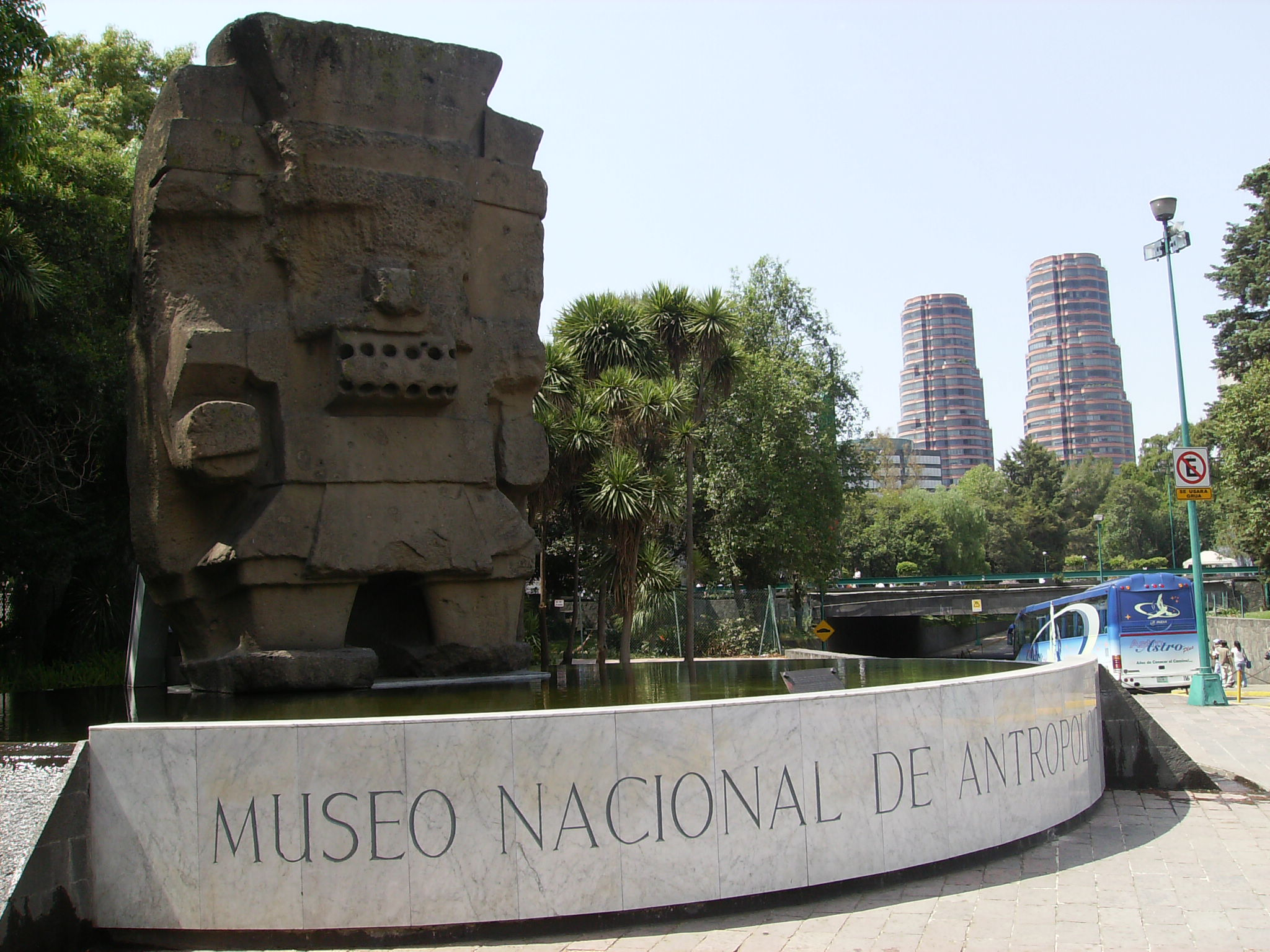 Entrada al Museo Nacional de Antropología de México, Paseo de la Reforma.